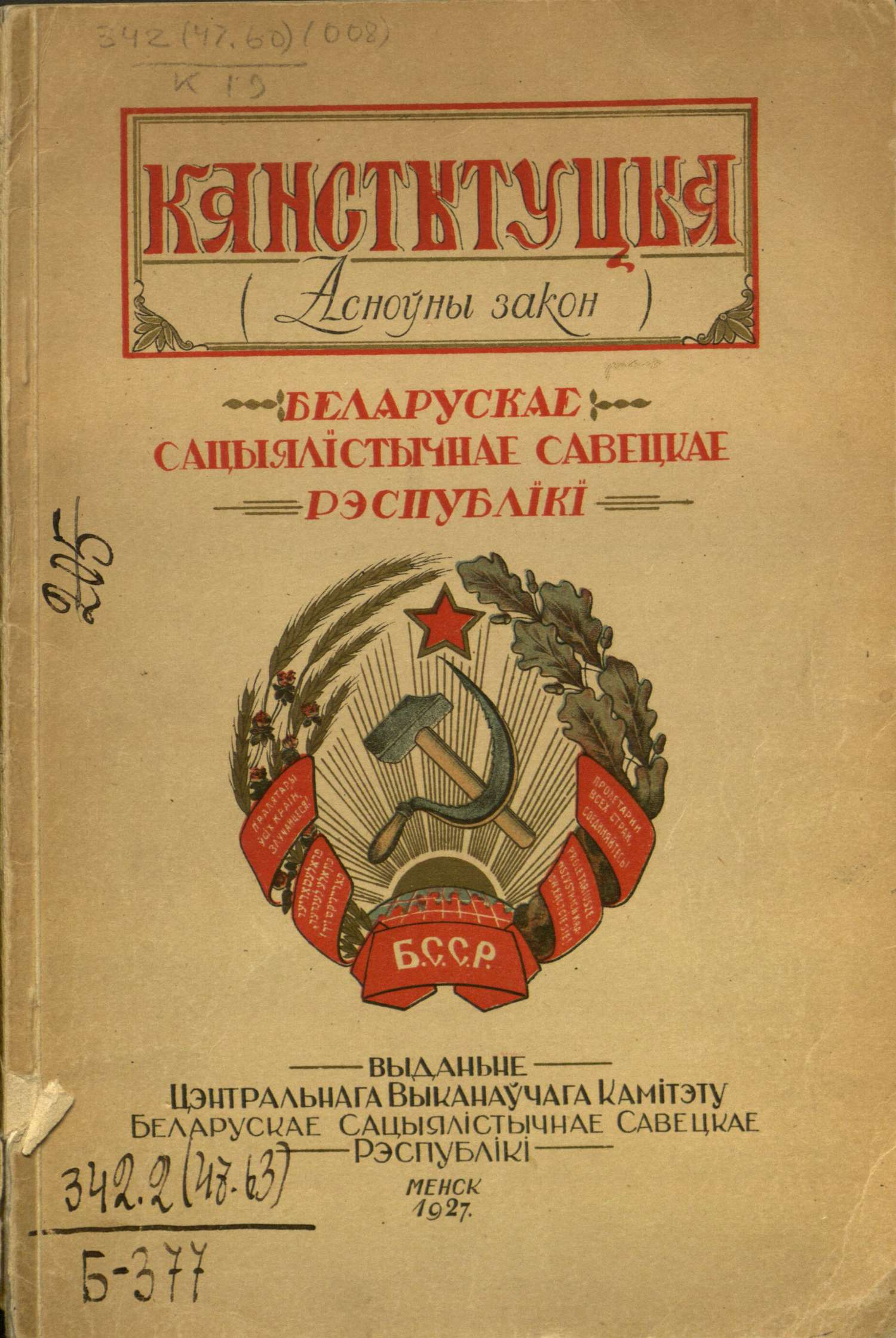 Титульный лист Конституции Белорусской Советской Социалистической Республики 1927 г.